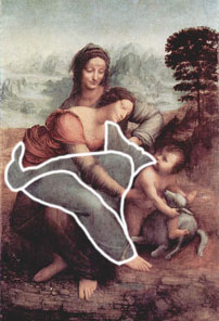 Contorno dell' "avvoltoio" rilevato da Sigmund Freud nel dipinto di Leonardo da Vinci "Sant'Anna, la Madonna, il Bambino" conservato al Louvre di Parigi